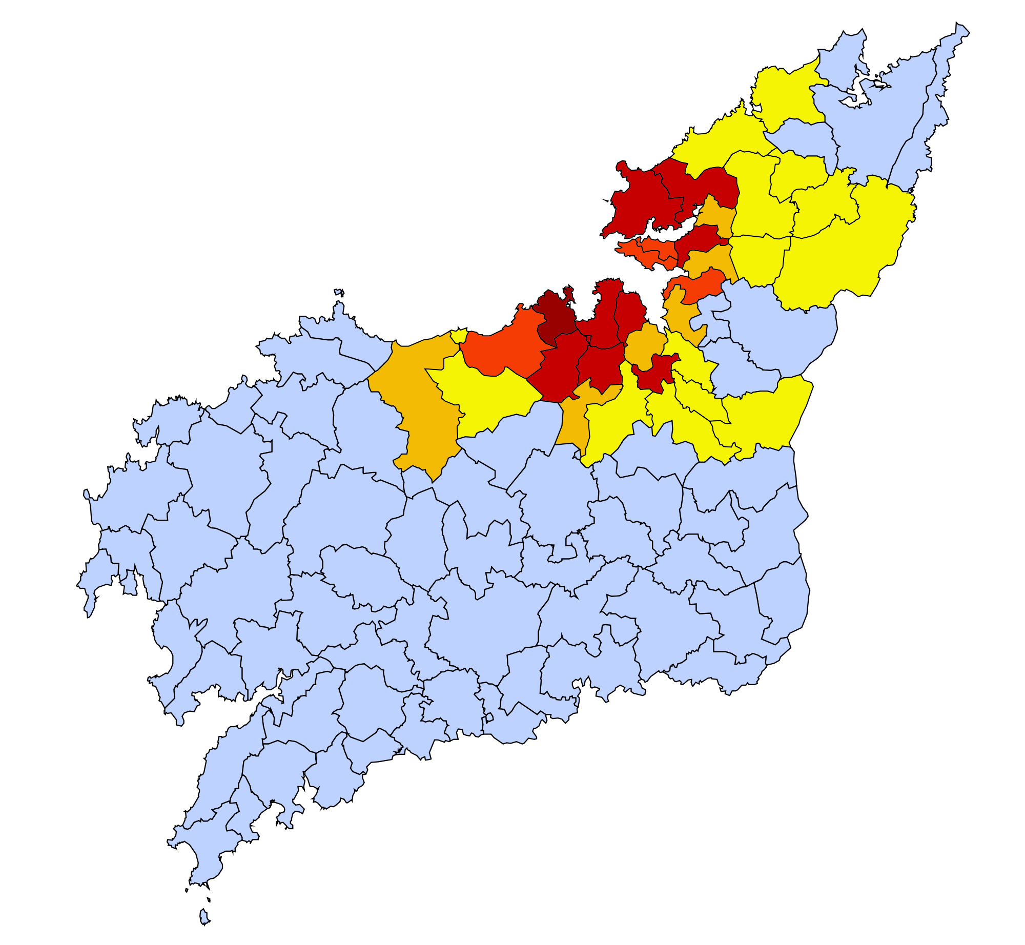 Densidad de población en la Región Urbana Ártabra